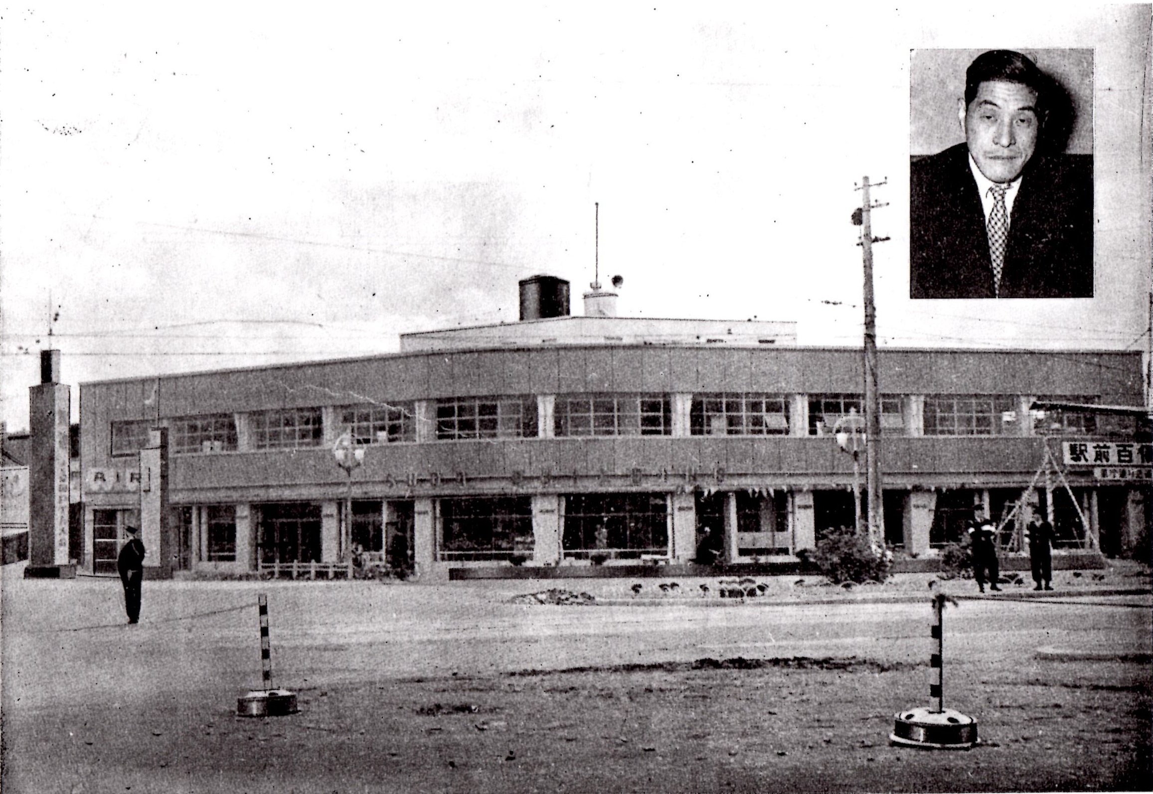 原題：「富山駅前 須田ビル」。肖像は須田ビル株式会社社長であった須田藤次郎。